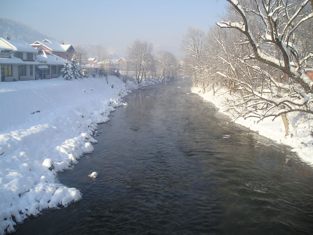 Ријека у Челинцу зими